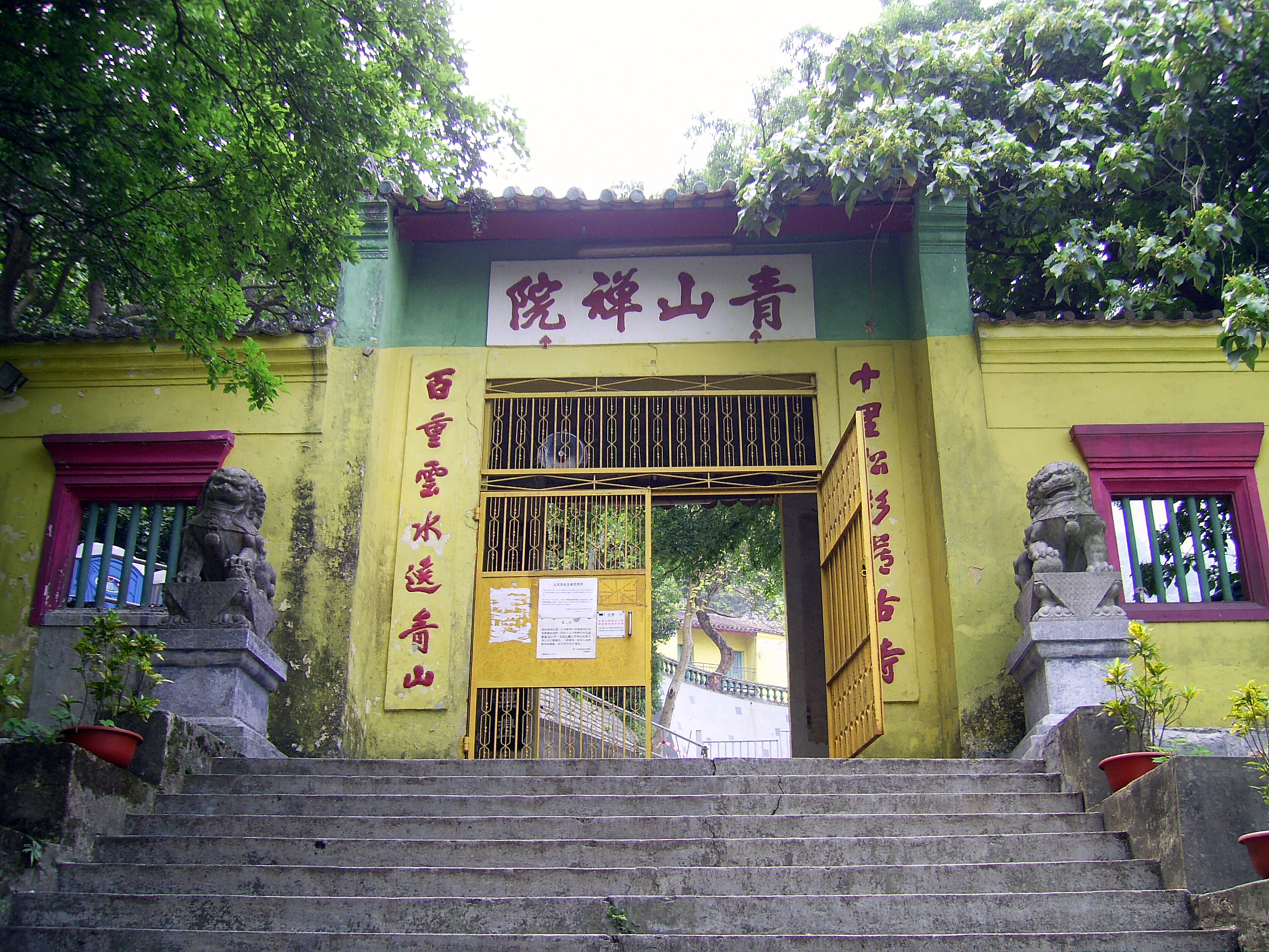 中文（香港）: 青山禪院山門